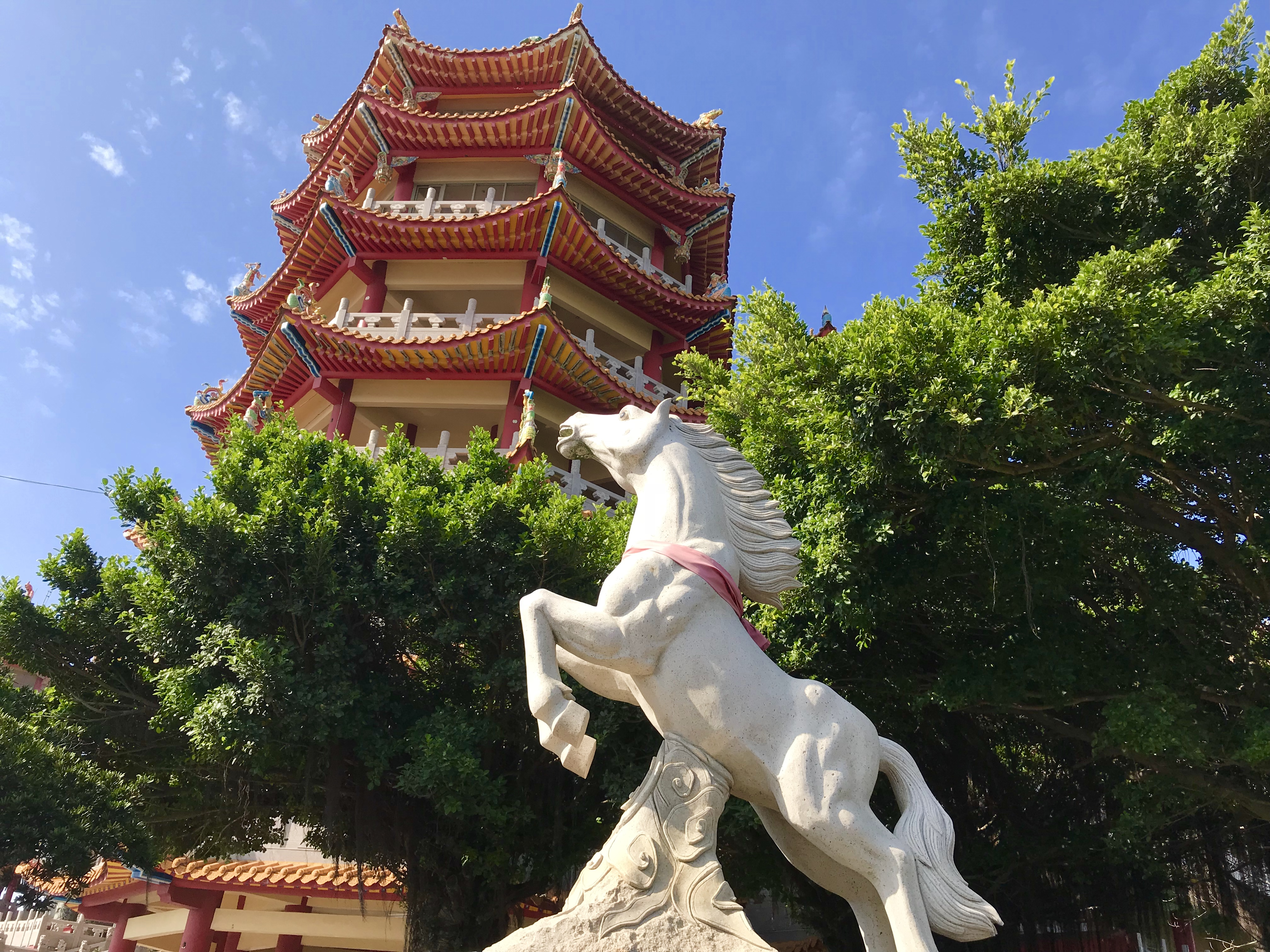 芳苑白馬峰普天宮白馬像